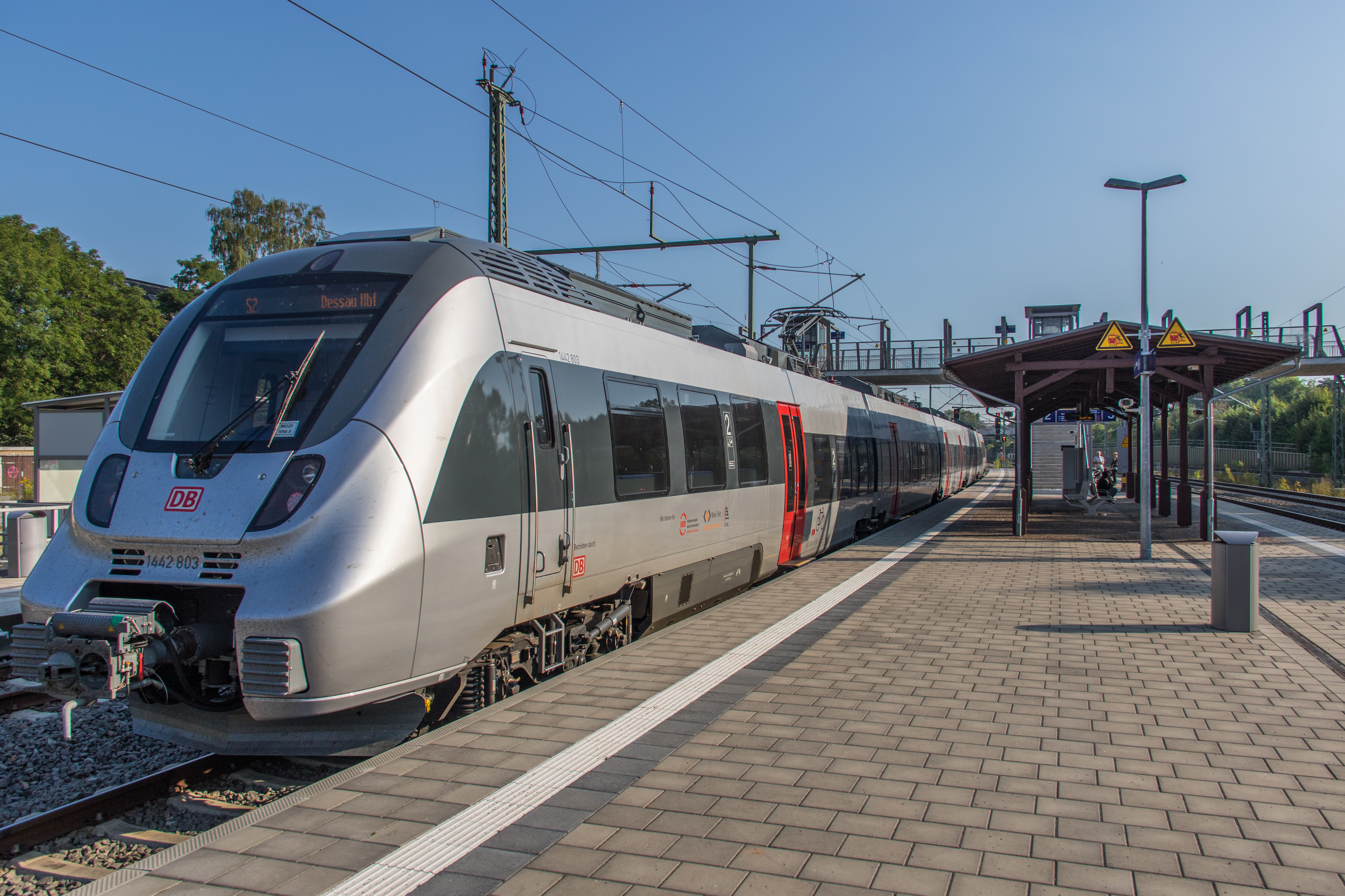 Talent 2, erster Einsatz für S-Bahn Mitteldeutschland II auf der S2 - Station Leipzig-Connewitz